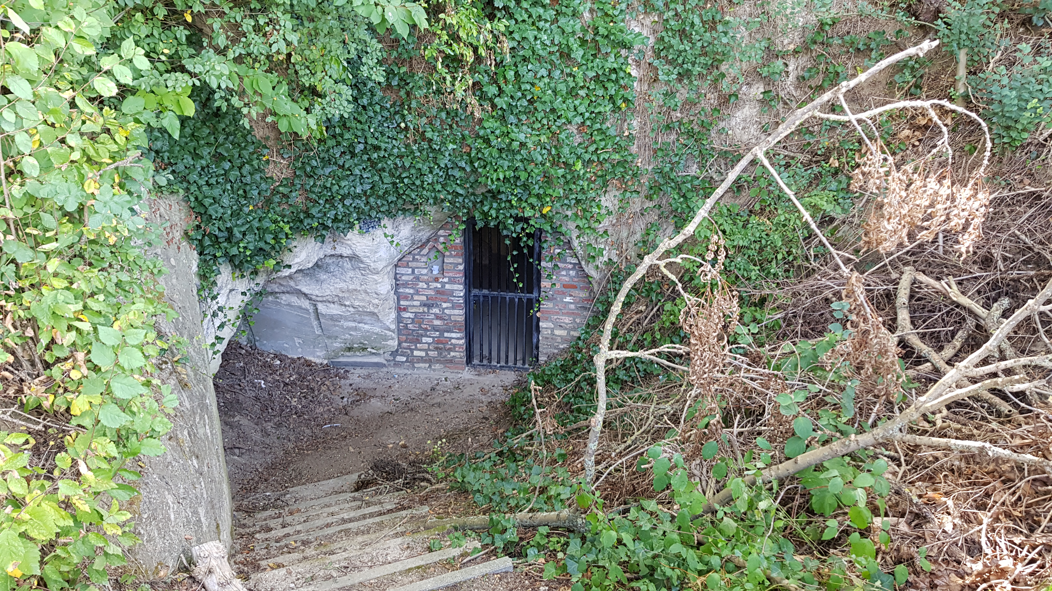 Groeve Theunissen II, Maastricht, Nederland